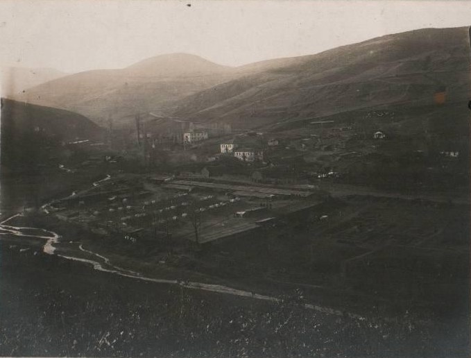 Свинище през Първата световна война